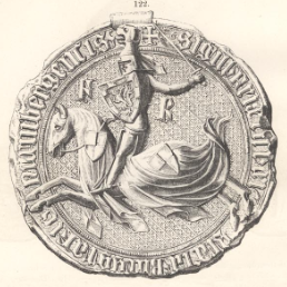 Friedrich V. 1378